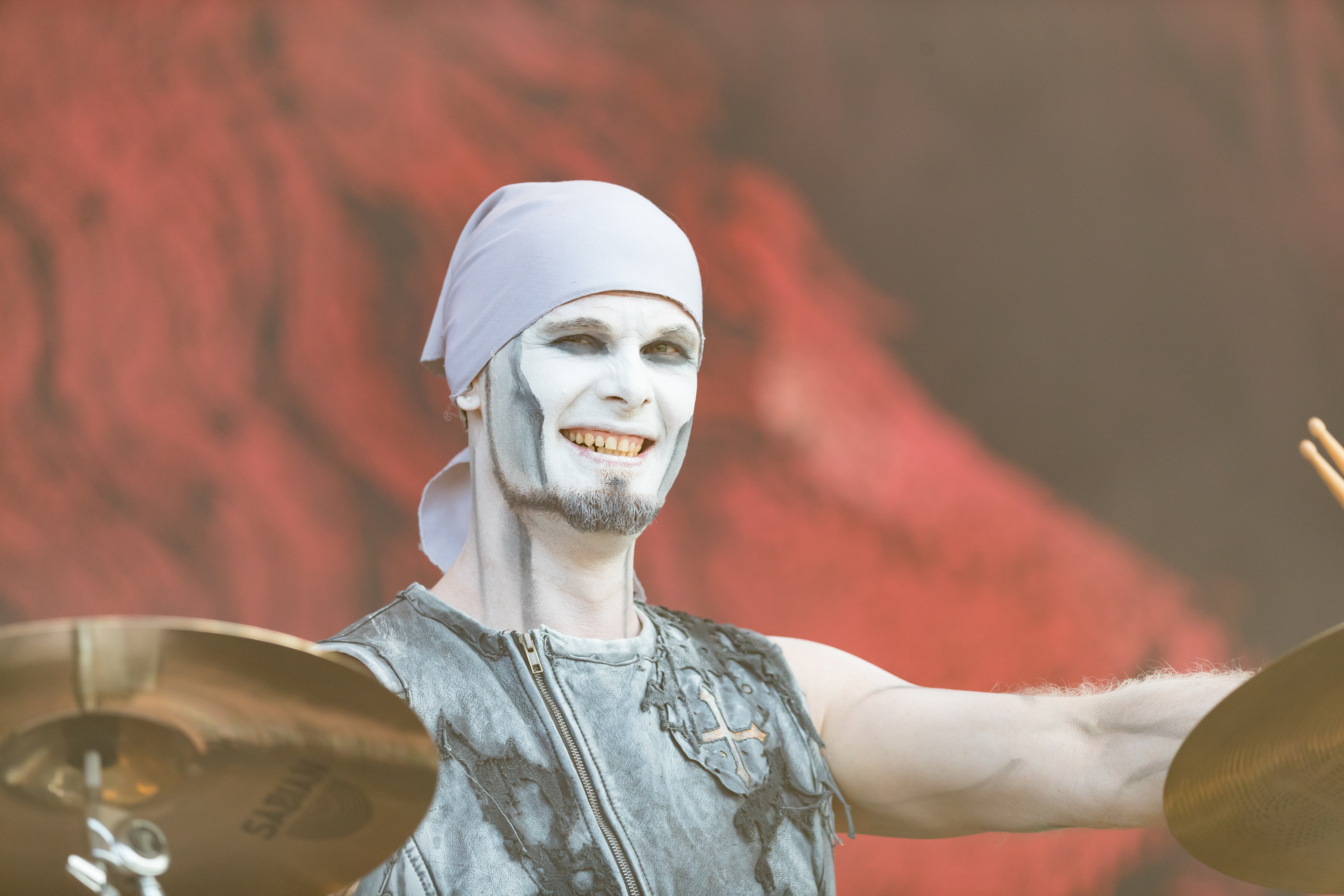 Powerwolf during Wacken Open Air at Schleswig-Holstein, Wacken, , Germany on 2017-08-05, Photo: Sven Mandel